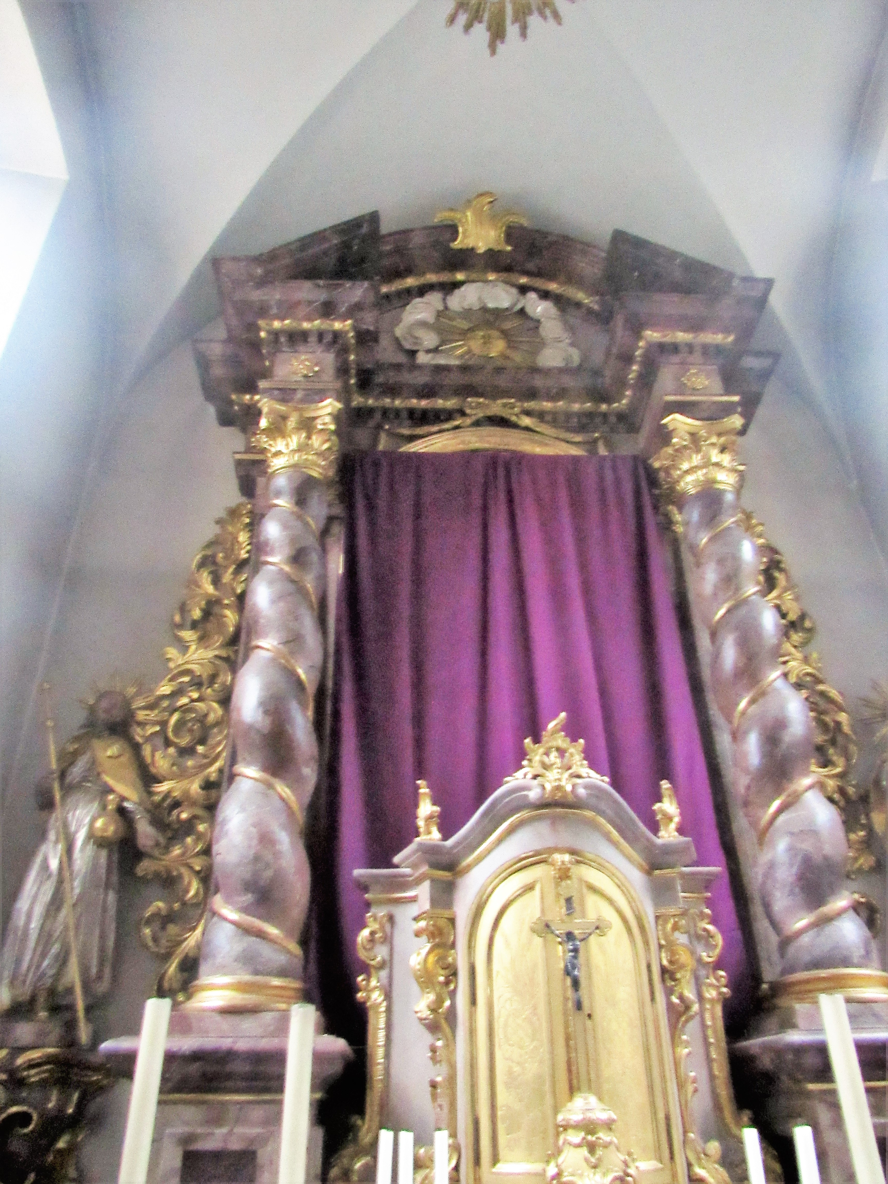 Hochaltar im alten Kirchenschiff